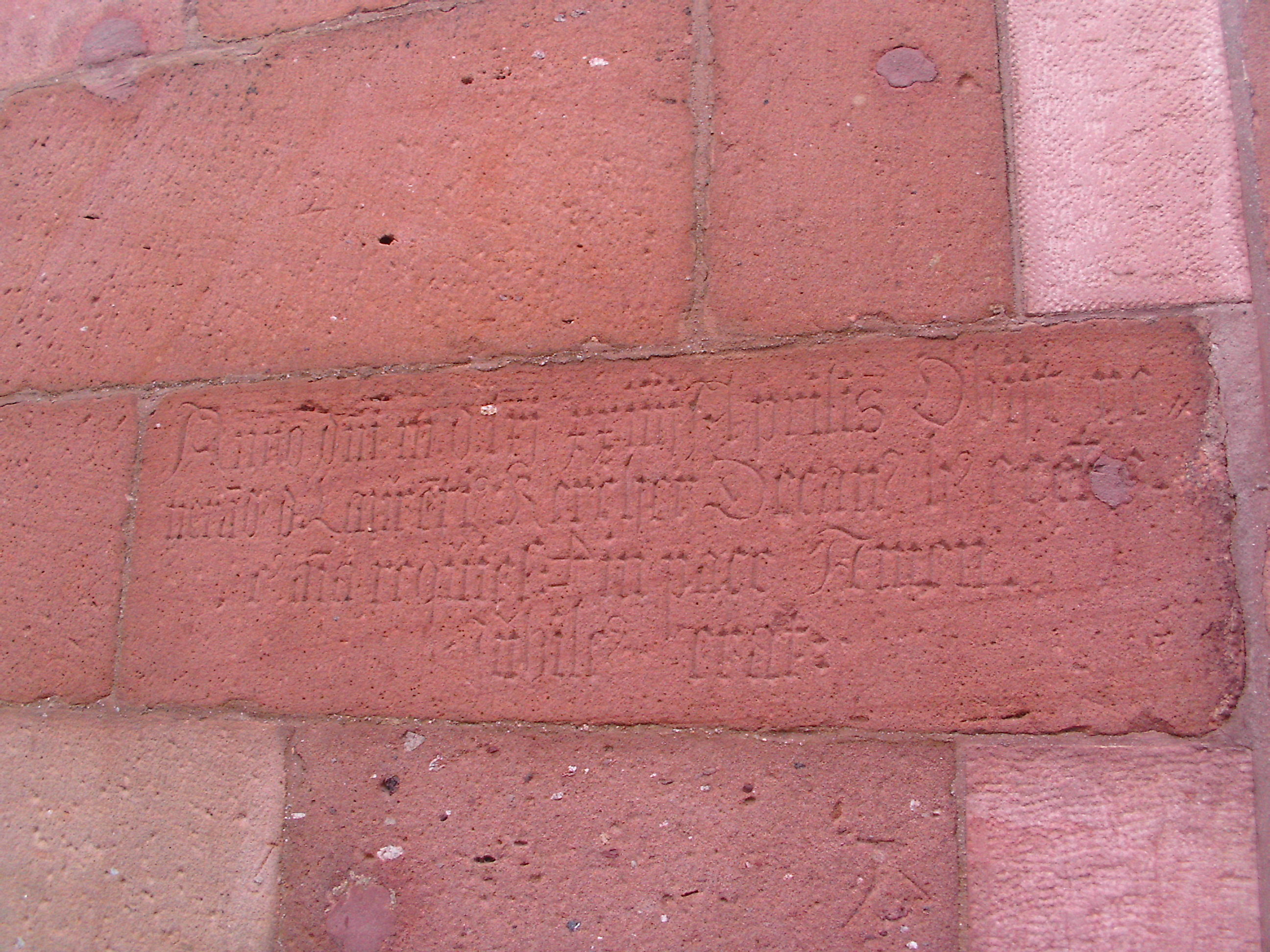 Grabinschrift Stiftsdekan Laurentius Kercher (+1561), Stiftskirche Neustadt an der Weinstraße